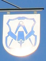 Walldorf, Baden-Württemberg: Wappenbaum an der Hauptstraße: Innungswappen der Dachdecker